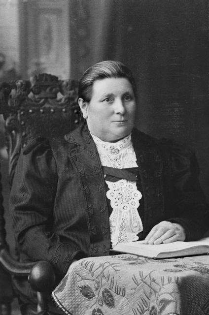 Lucina Hagman; pysty, mustavalkoinen